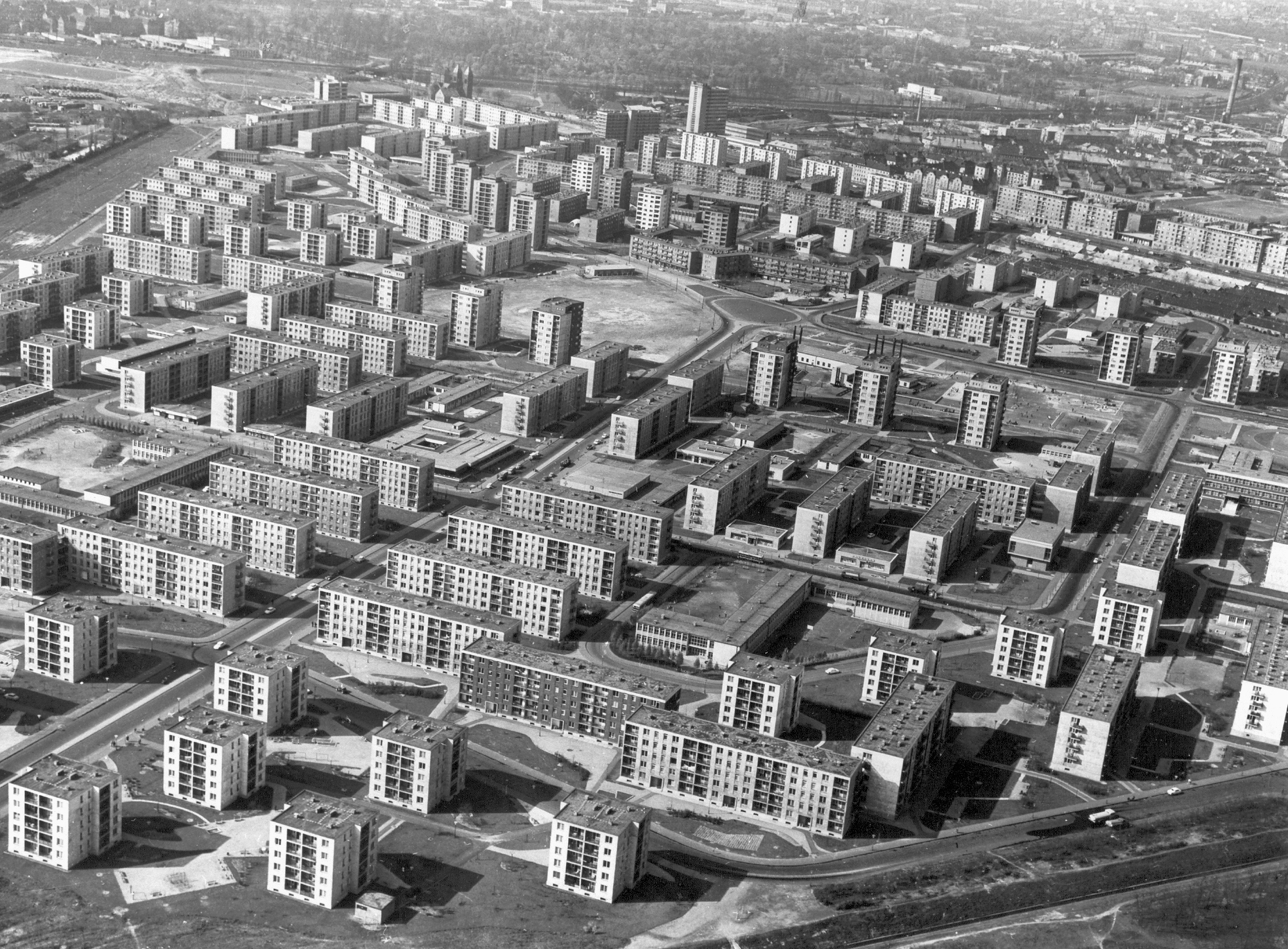 József Attila lakótelep az Üllői út felé nézve. Location: Hungary, Budapest IX. Tags: aerial photo, blocks, Budapest Title: József Attila lakótelep az Üllői út felé nézve.